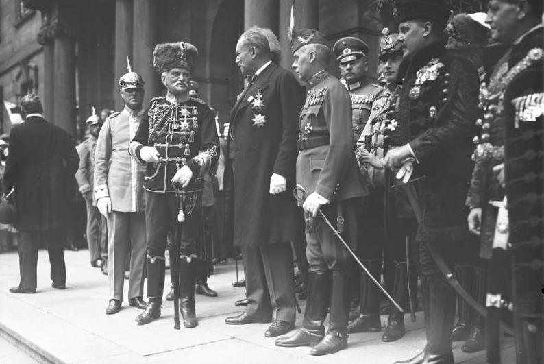 Der erste grosse Waffentag der deutschen Kavallerie fand unter Anwesenheit des Generalfeldmarschalls von Mackensen und vielen Verbänden des alten Heeres in Dresden statt. Generalfeldmarschall von Mackensen auf der Freitreppe des Dresdner Rathauses inmitten von Abordnungen ausländischer Offiziere während des Vorbeimarsches der alten deutschen Kavallerie